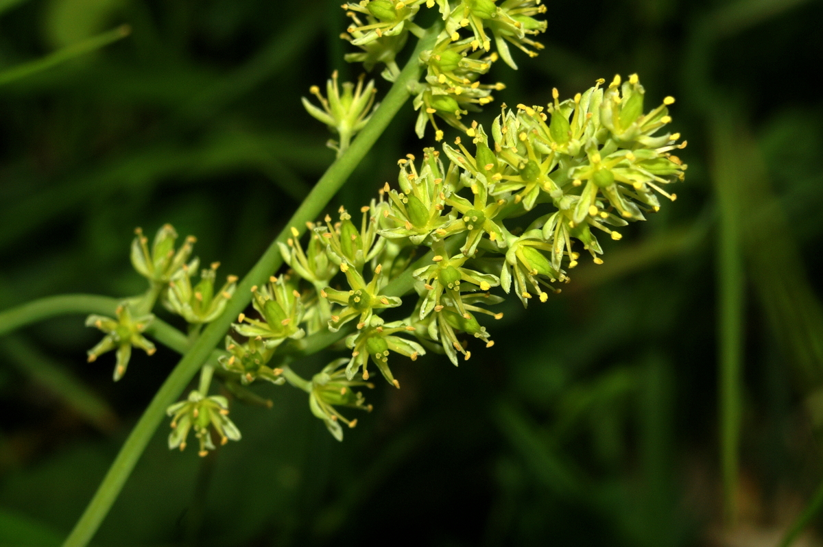 Navadna žiljka v Setnici.